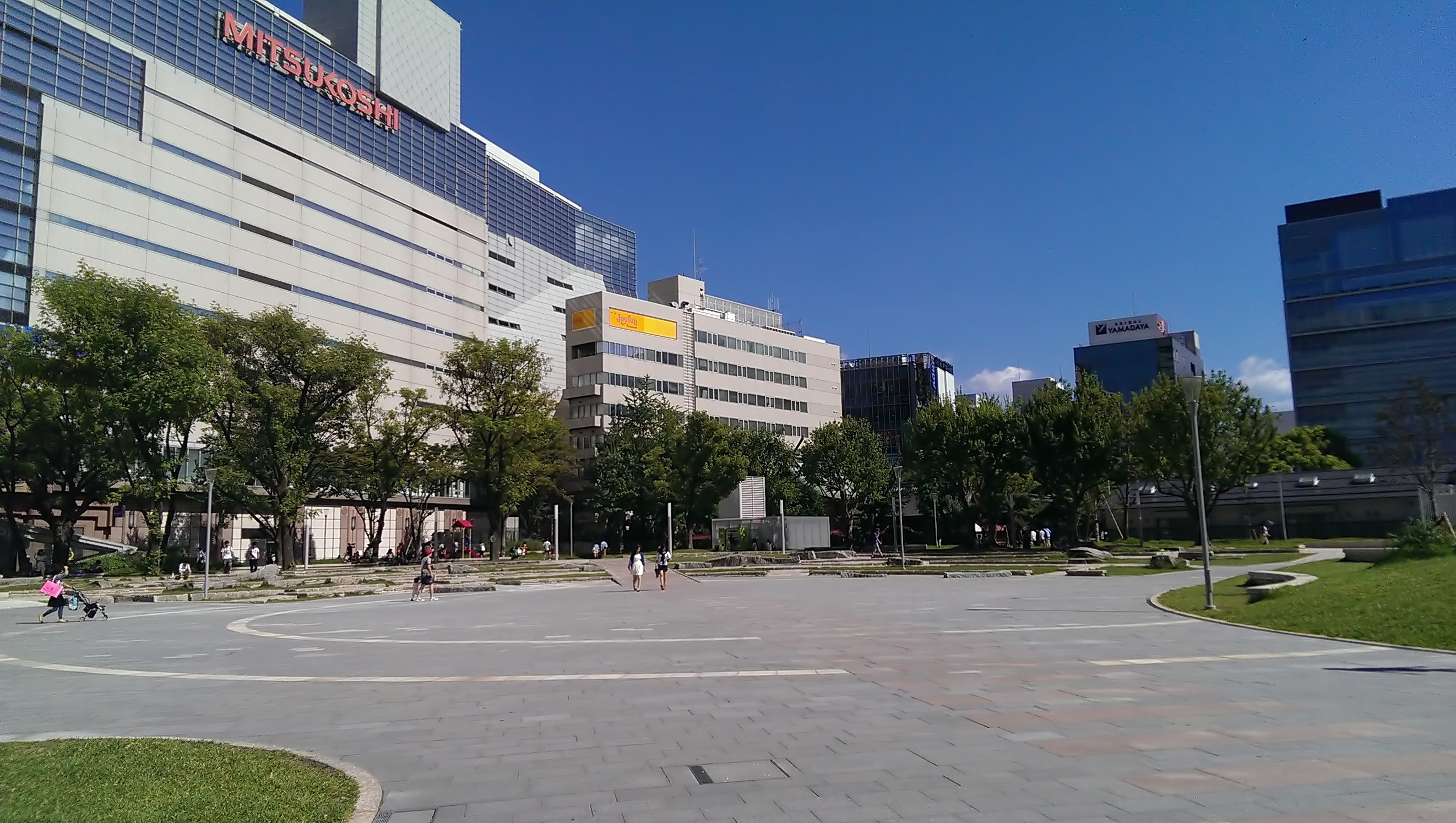 改修後の警固公園。2013年撮影